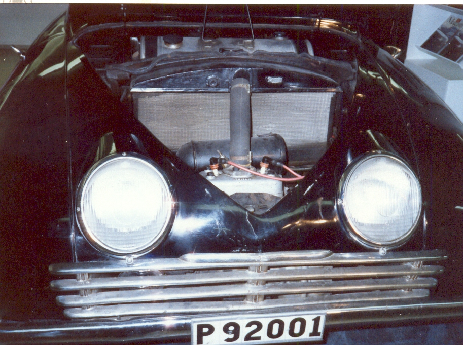 Saab 92001 engine